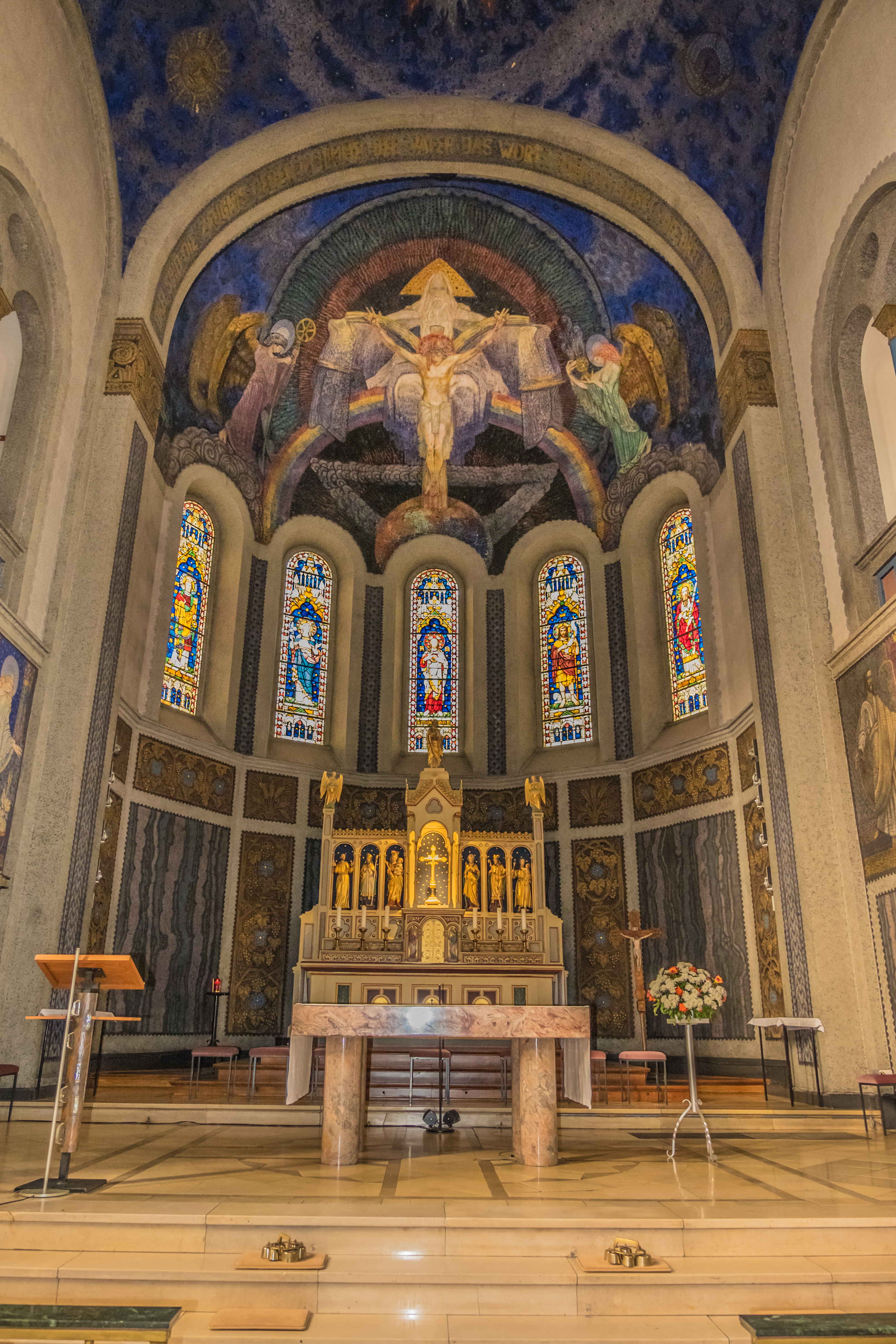 Altar und Apsis des "Taunusdoms" Pfarrkirche St. Johannes in Kirdorf